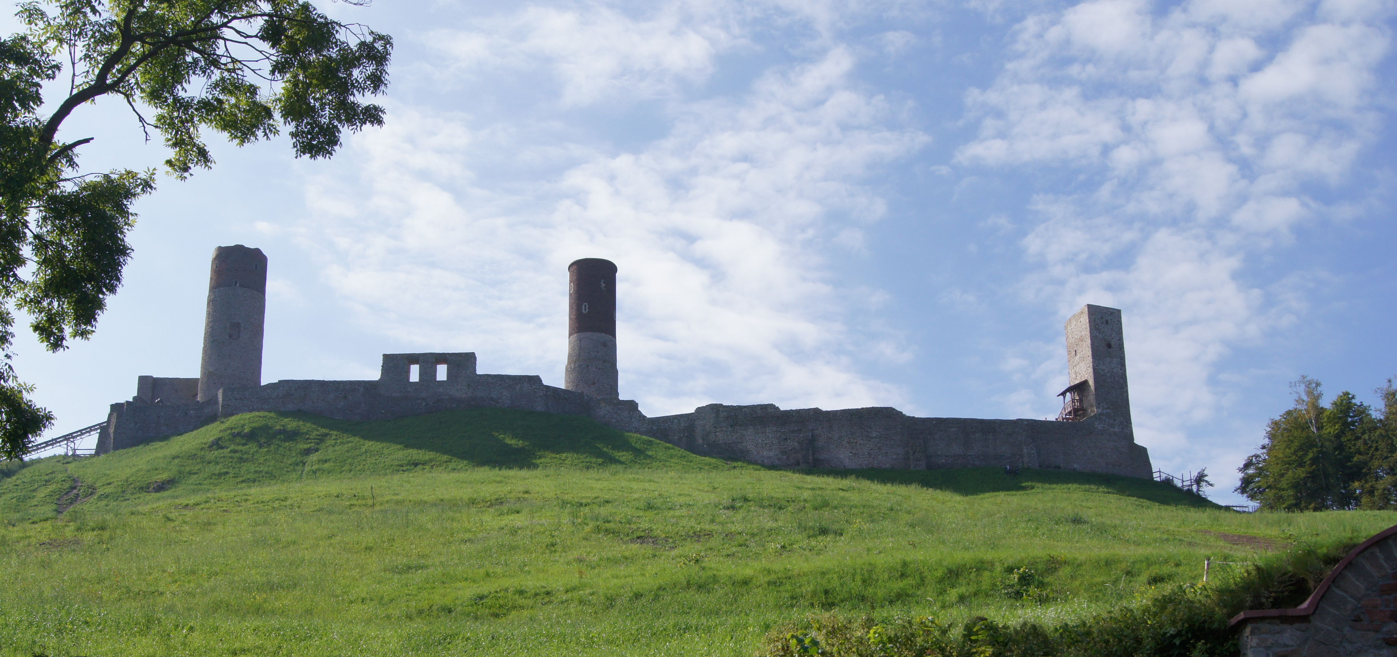 Zamek w Chęcinach